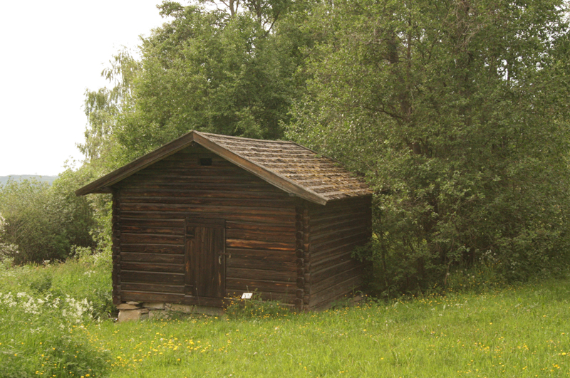 Kvernhus fra Malungen, Stange. Bygd 1888. I dag på Hedmarksmuseet, Hamar.